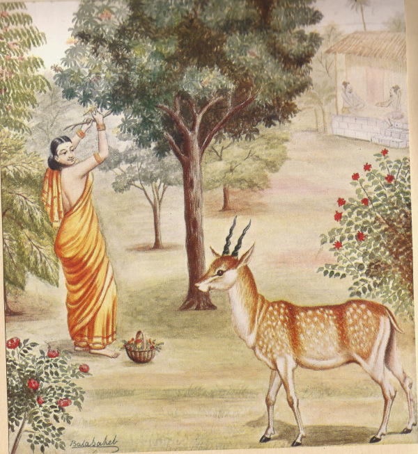 Chitra Ramayana (Illustrated Ramayana) is a simplified story of the great Indian epic in Kannada. The type is bold and beautiful. The thick pages have become brittle and need careful handling. Printed by B. Miller, Superintendent, British India, Press, Mazgaon, Bombay. It was published by, Shrimat Balasaheb Pandit Pant Pratinidhi, chief of Aundh, at Aundh, Satara district. The Kannada version is by Ramachandra Madhwa Mahishi The date shown is 1916. It is all the more important because the book contains illustrations painted by the publisher also called Bhavan Rao Shrinivas Rao, the ruler of the state of Aundh himself.